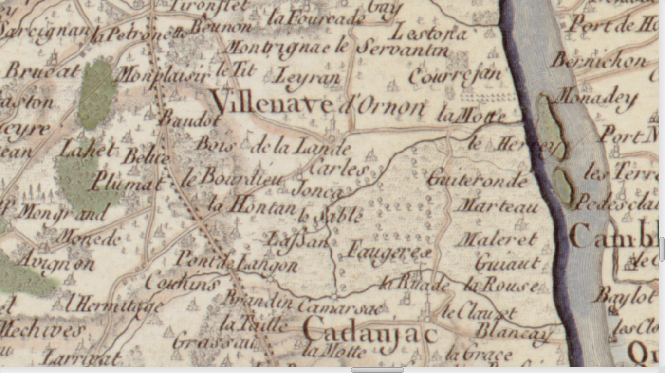 Carte de Cassini, feuille n°104, 1756 : zoom sur l'embouchure de l'Eau Blanche.